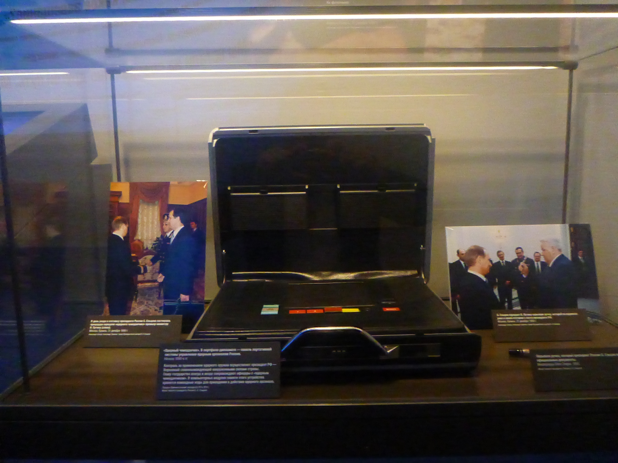 Может бахнем? - Обязательно бахнем и не раз, весь мир в труху, но потом! (Из к ф ДМБ)